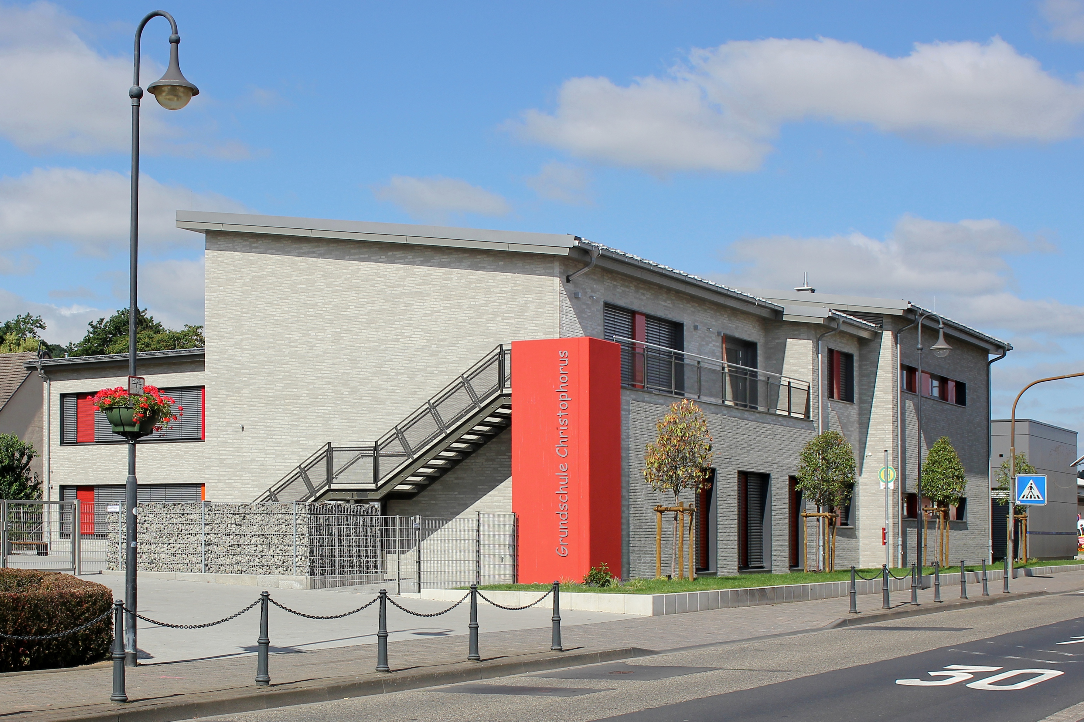 Christophorusschule (Grundschule Christophorus) in Mülheim-Kärlich, Nord-Ost-Seite, Clemensstraße 2